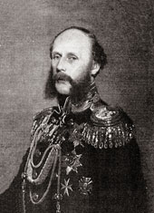 СТАКЕЛЬБЕРГ Эрнест Густавович Посланник России в Австрии 1864-1868